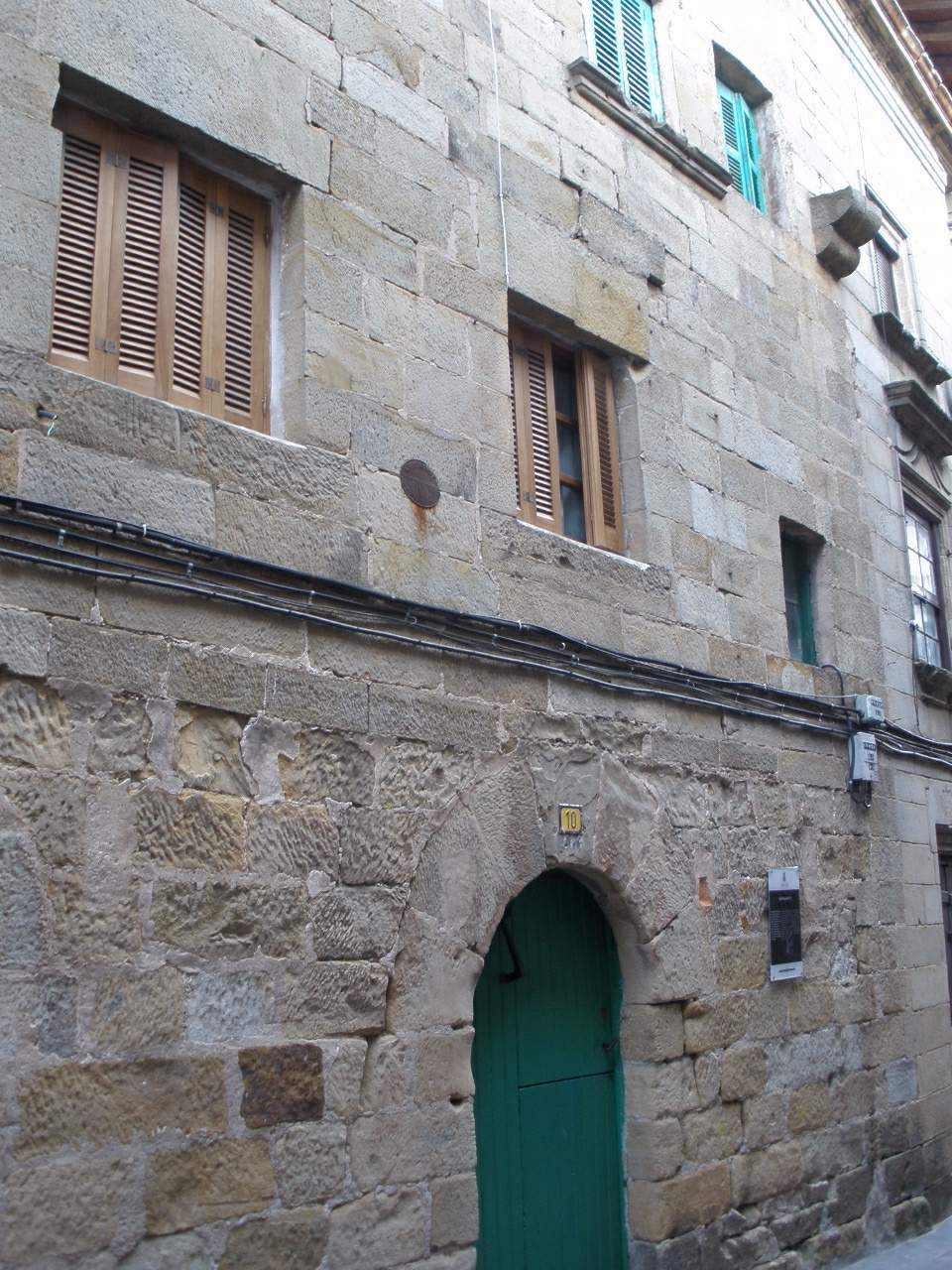 Orio (Gipuzkoa)